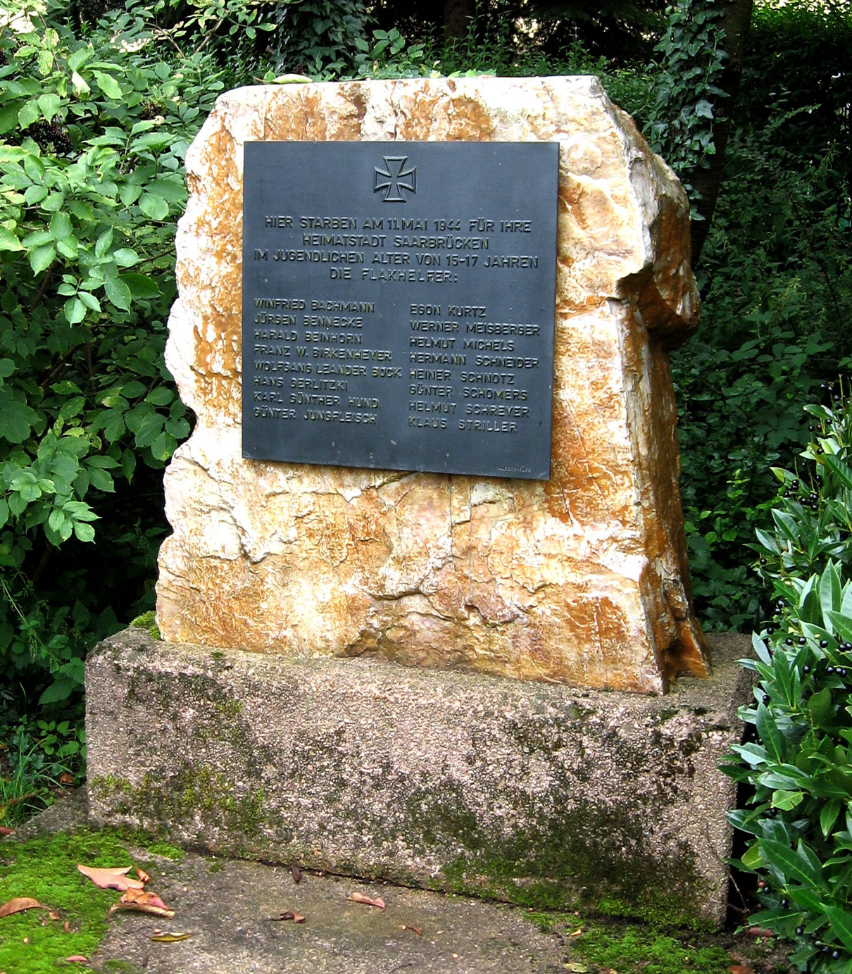 Gedenkstein für gefallene Flakhelfer in Saarbruecken, Strasse "Am Lulustein"